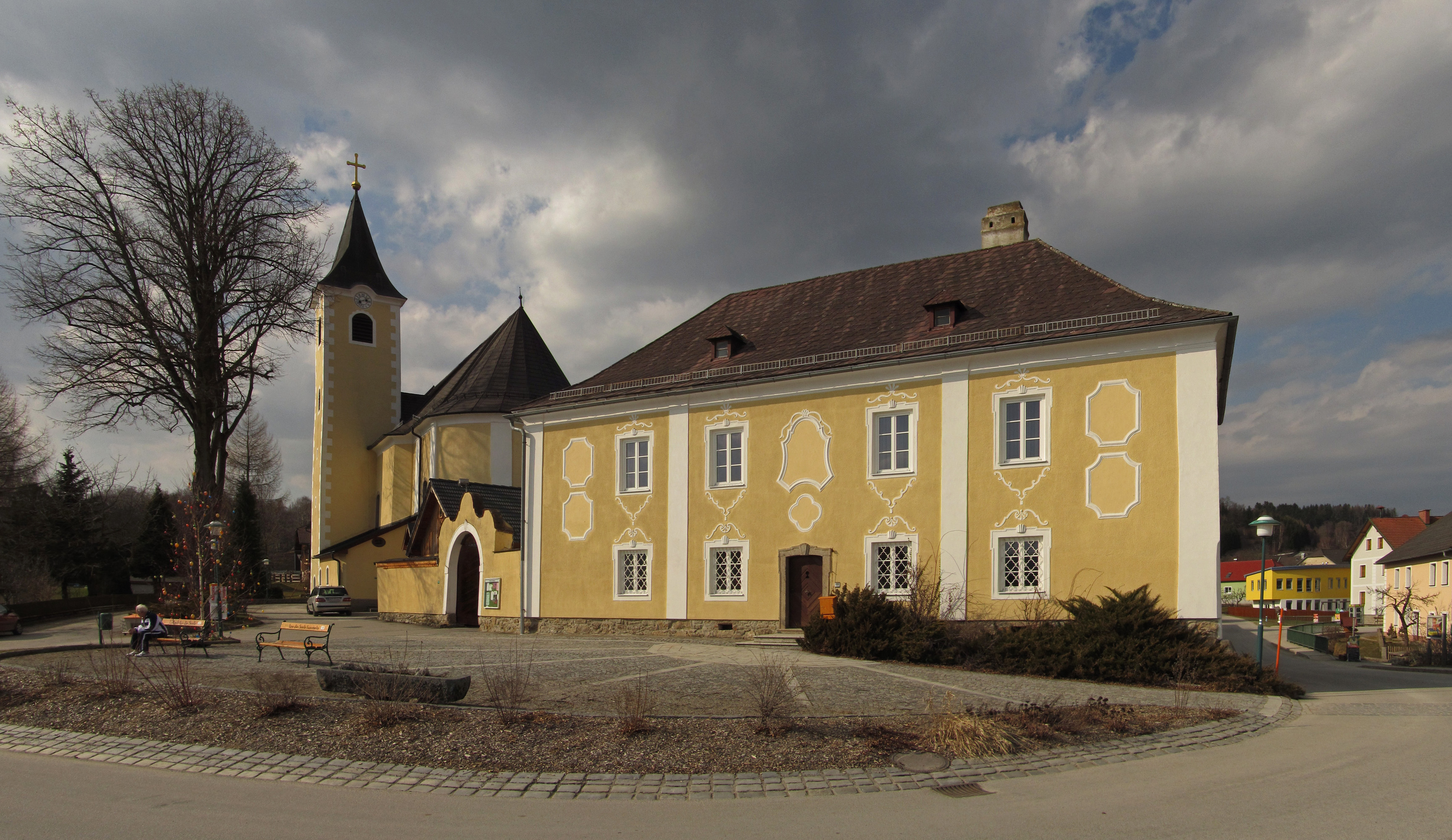 Pfarrhof